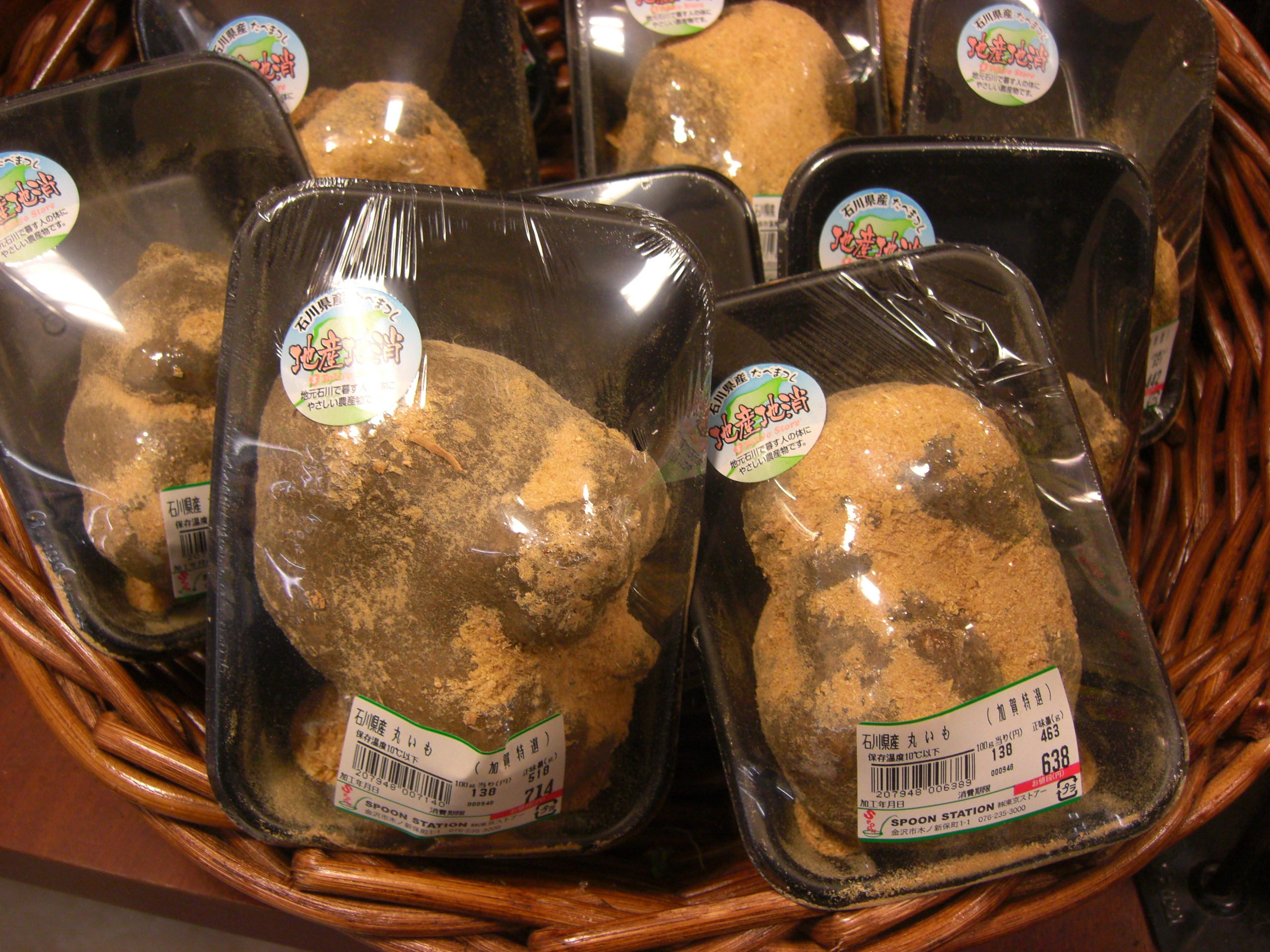 加賀丸いも 加賀野菜 石川県金沢